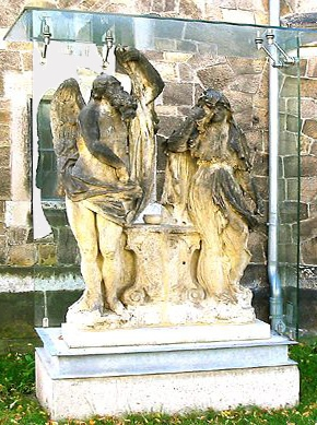 Denkmal "Chronos und die Trauernde" auf dem Kirchhof der Friedenskirche in Radebeul-Kötzschenbroda